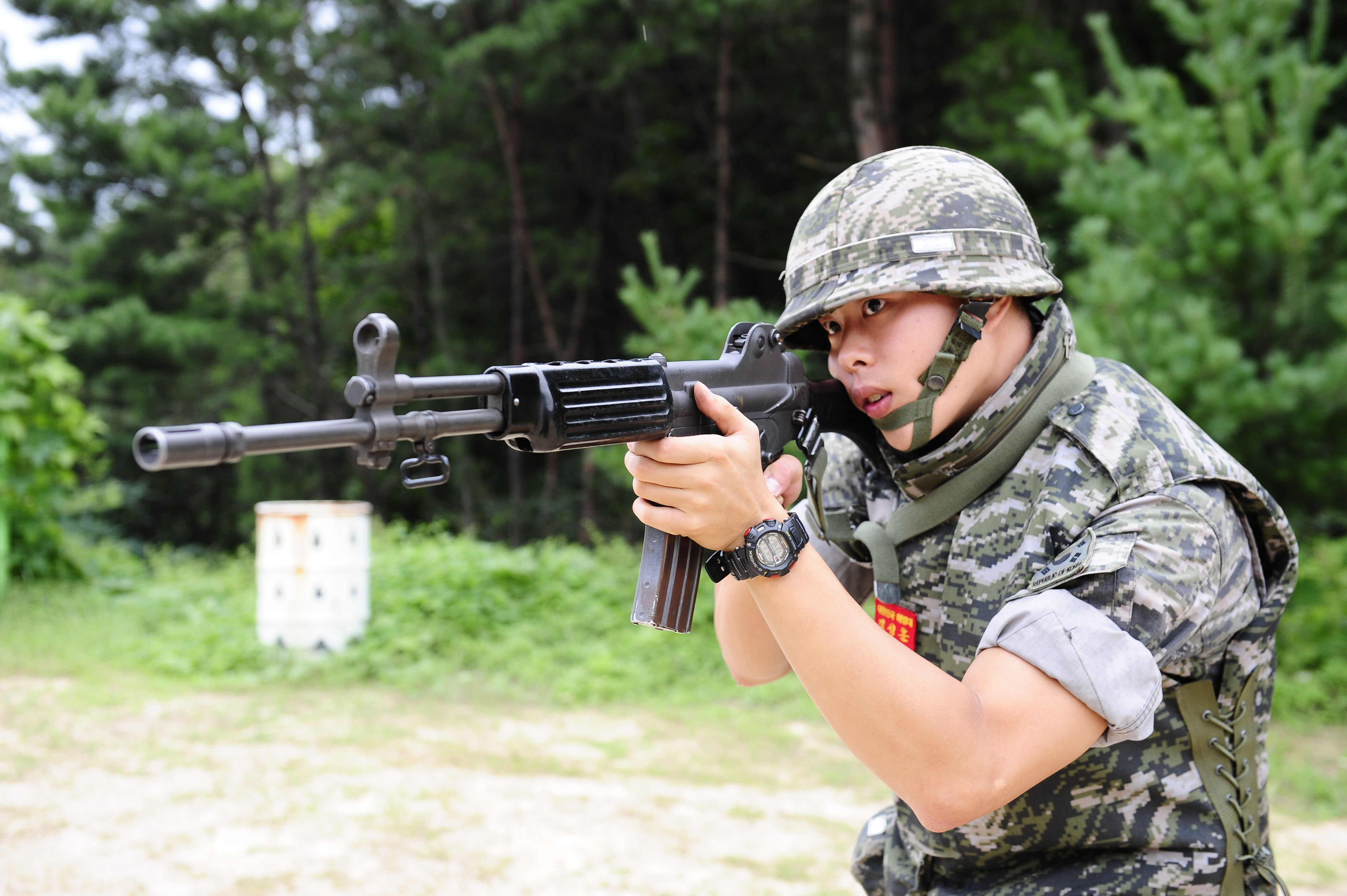 촬영 - 임영식 기자